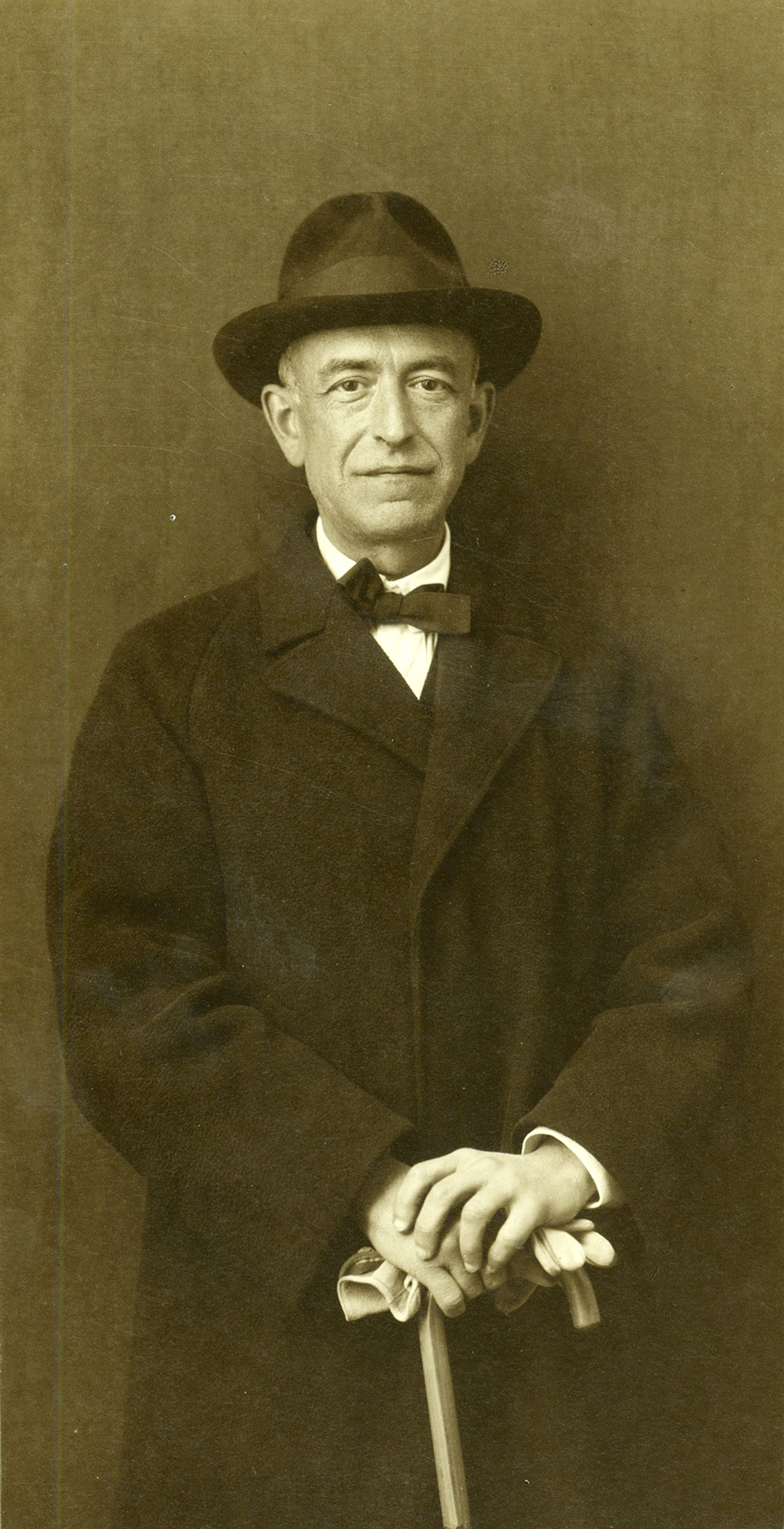 Manuel de Falla con bastón